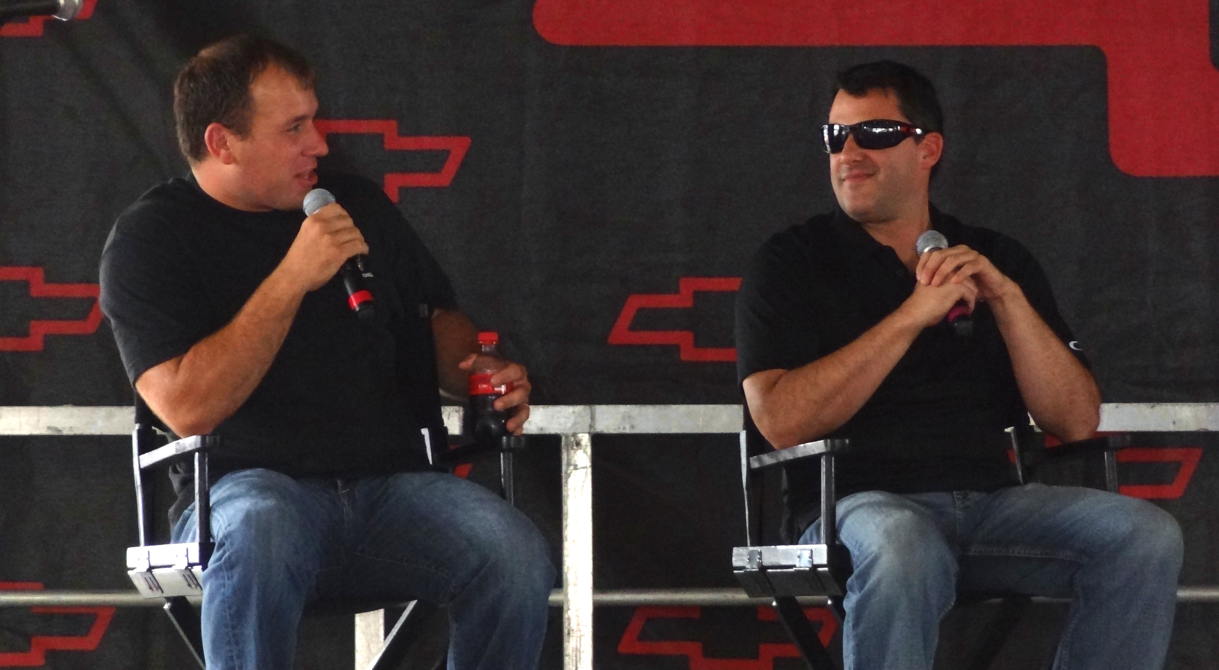 Newman (l.) und Stewart beim Fan-Meeting von Chevrolet.